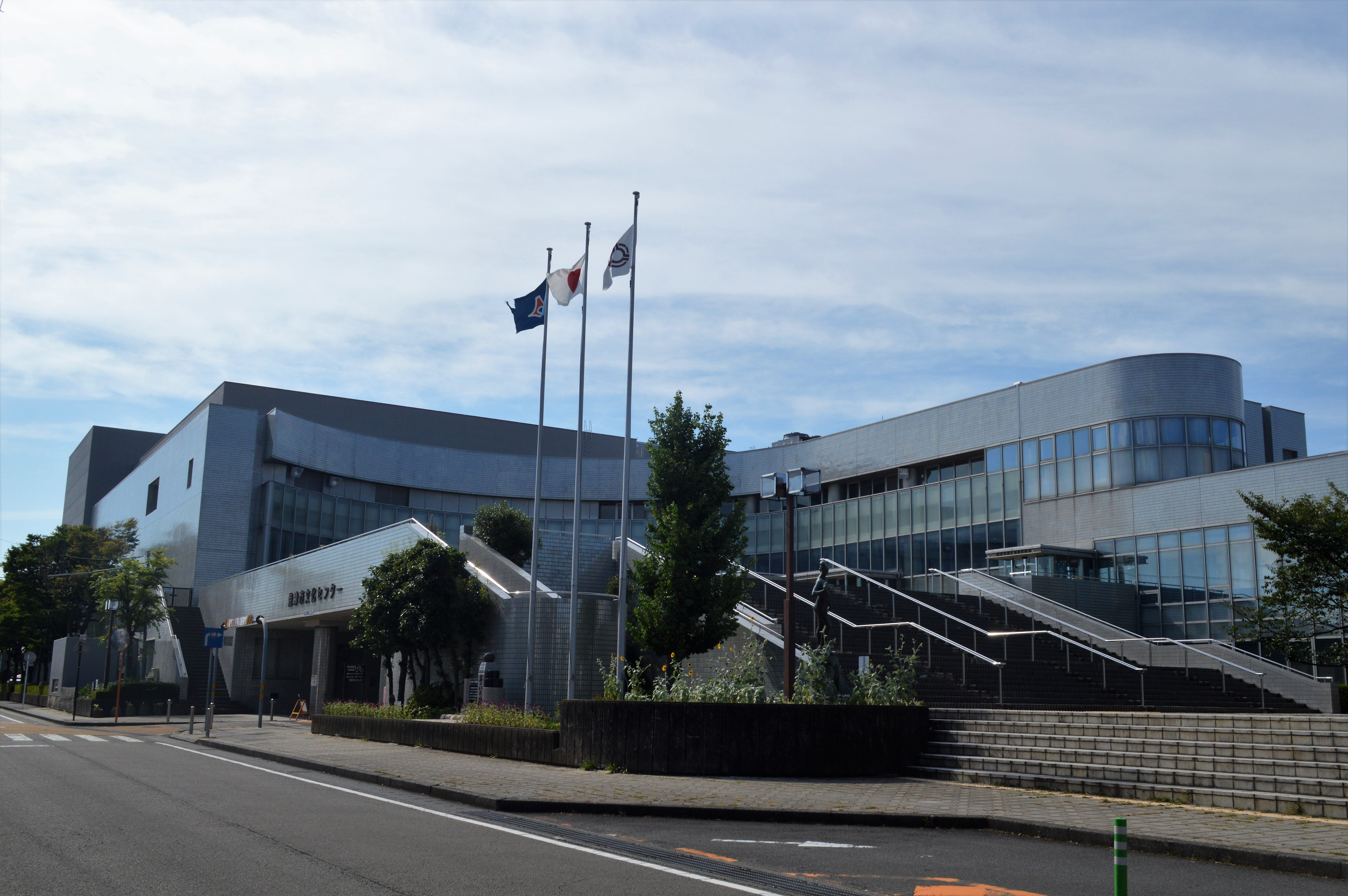 静岡県焼津市の焼津文化会館。